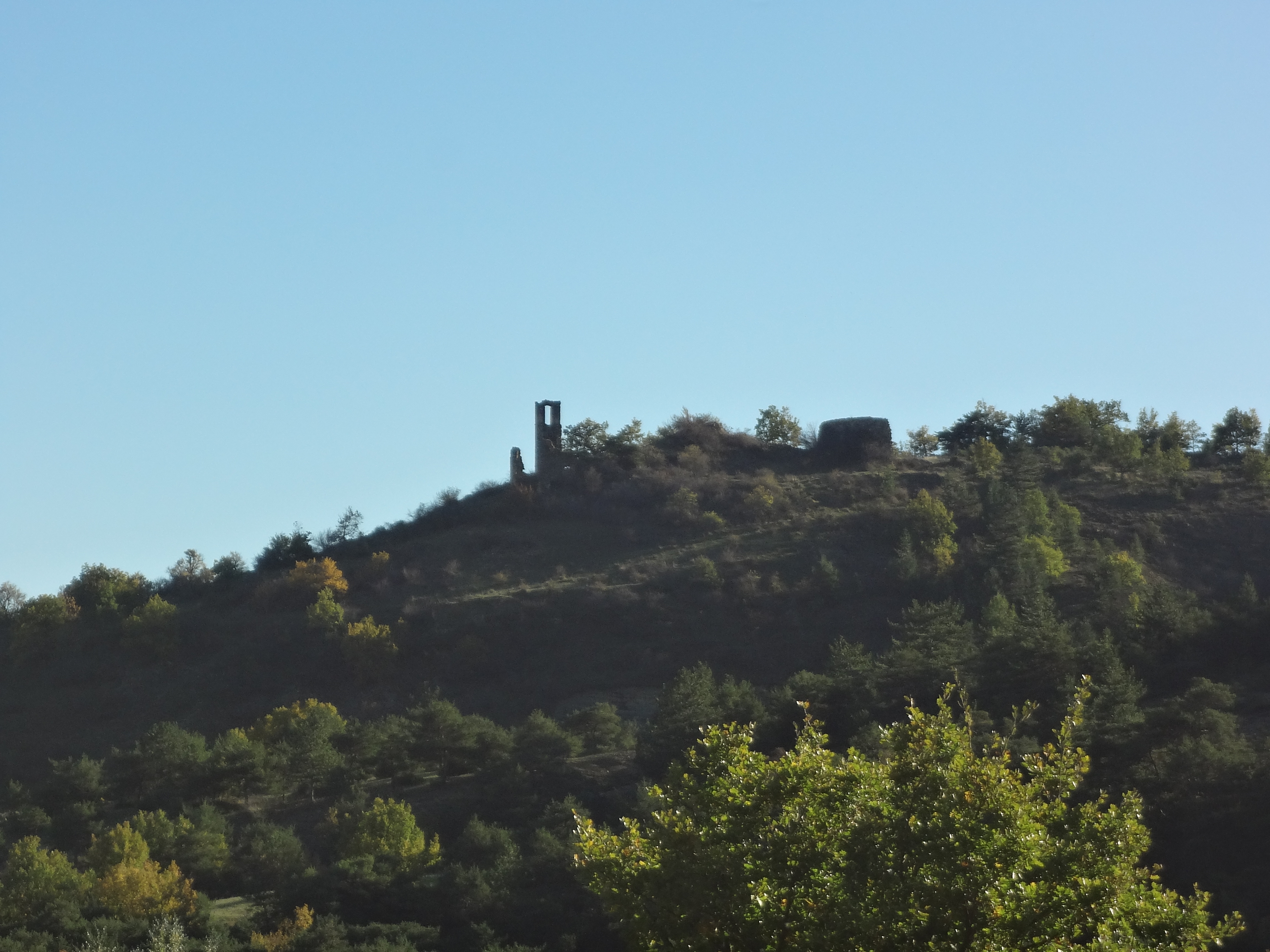 Ruines du Vieux Montlaux (vues du nord)